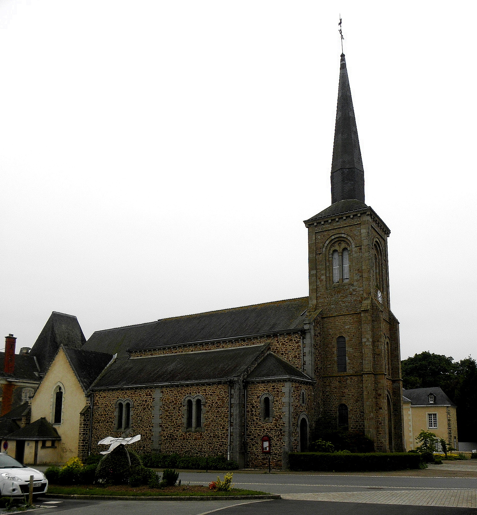 Église Saint-Paterne de Saint-Poix (53).